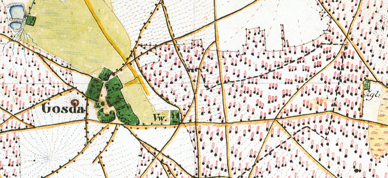 Gosda, Gemeinde Wiesengrund, Landkreis Spree-Neiße, Brandenburg, Ausschnitt aus dem Urmesstischblatt 4253 Forst von 1845